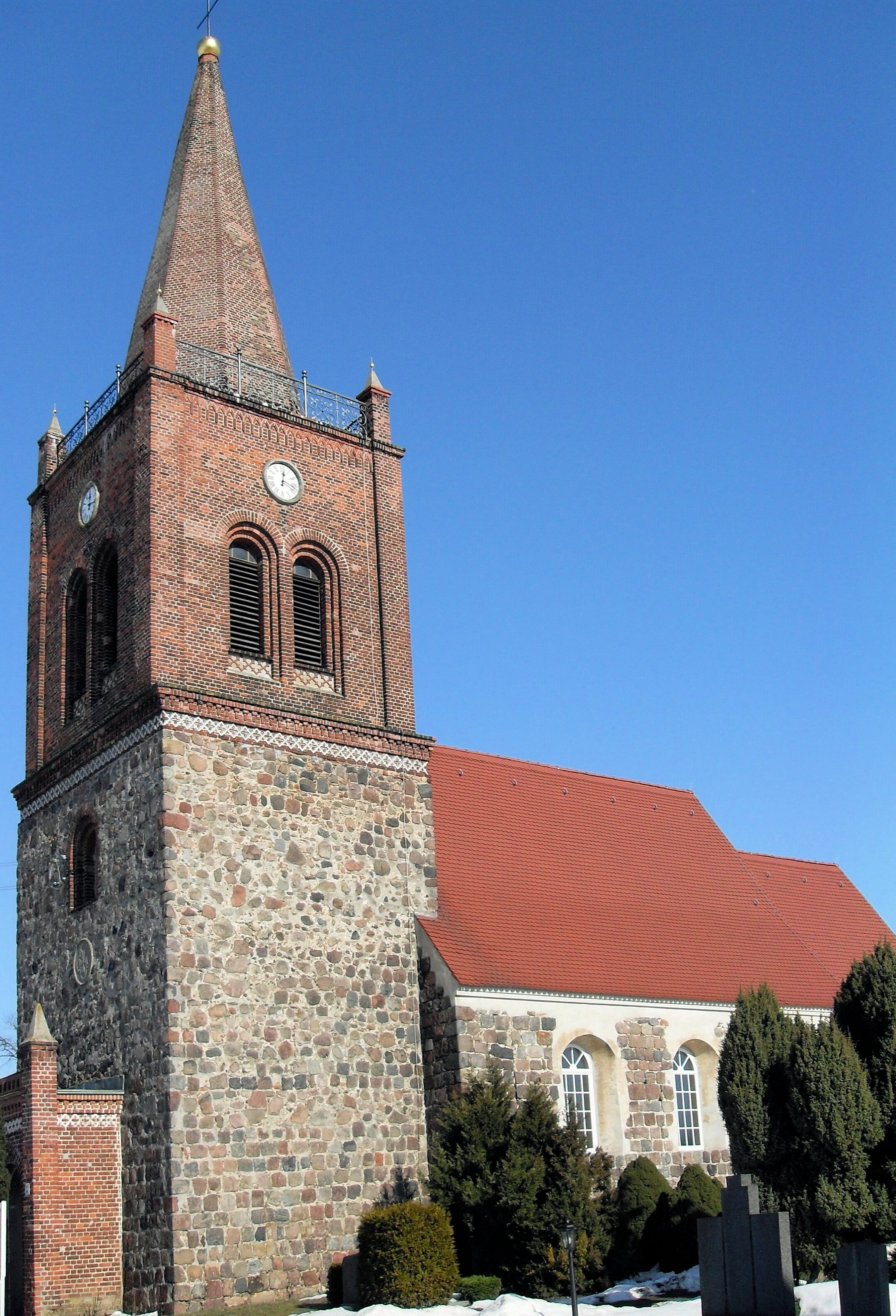 Kirche in Marxdorf, Gemeinde Vierlinden, Deutschland